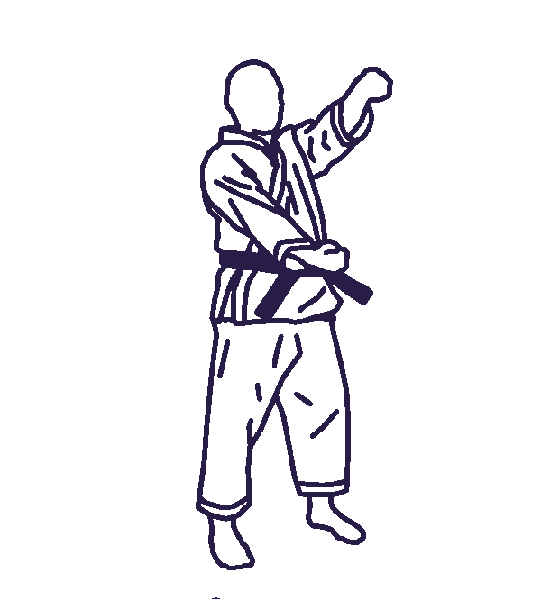 Soco em forma de U do Caratê